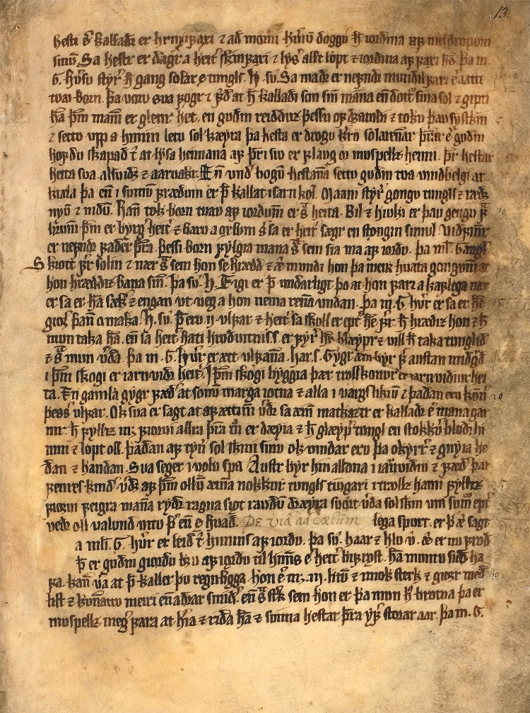 CodexWormianus AM 242 fol, bl. 13r